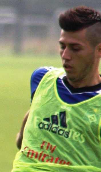 Valmir Nafiu beim HSV-Training am 25. Juli 2013.